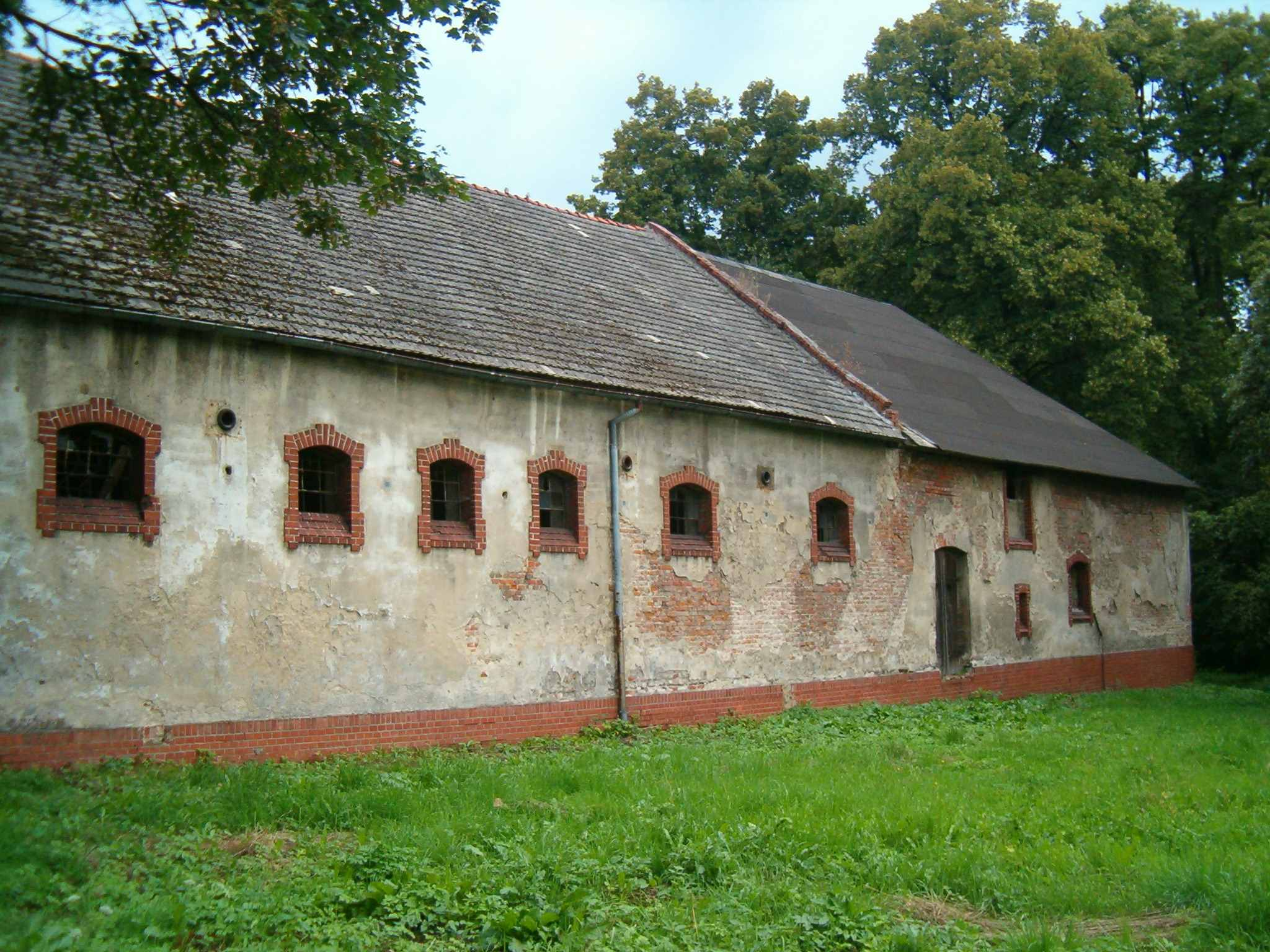 Wozownia po prawej, stajnia po lewej. Pałac w Krowiarkach.